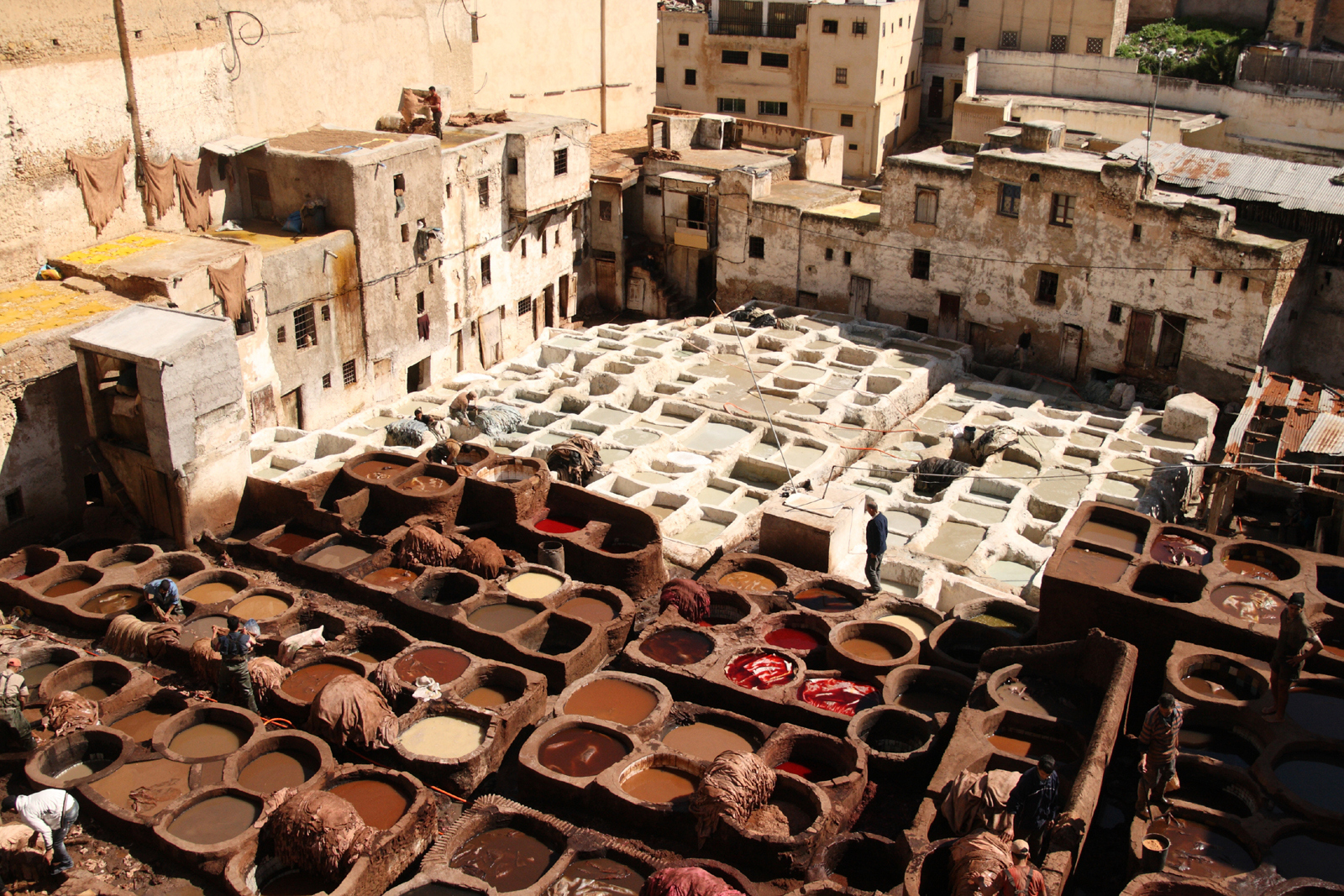 Tannerie à Fes